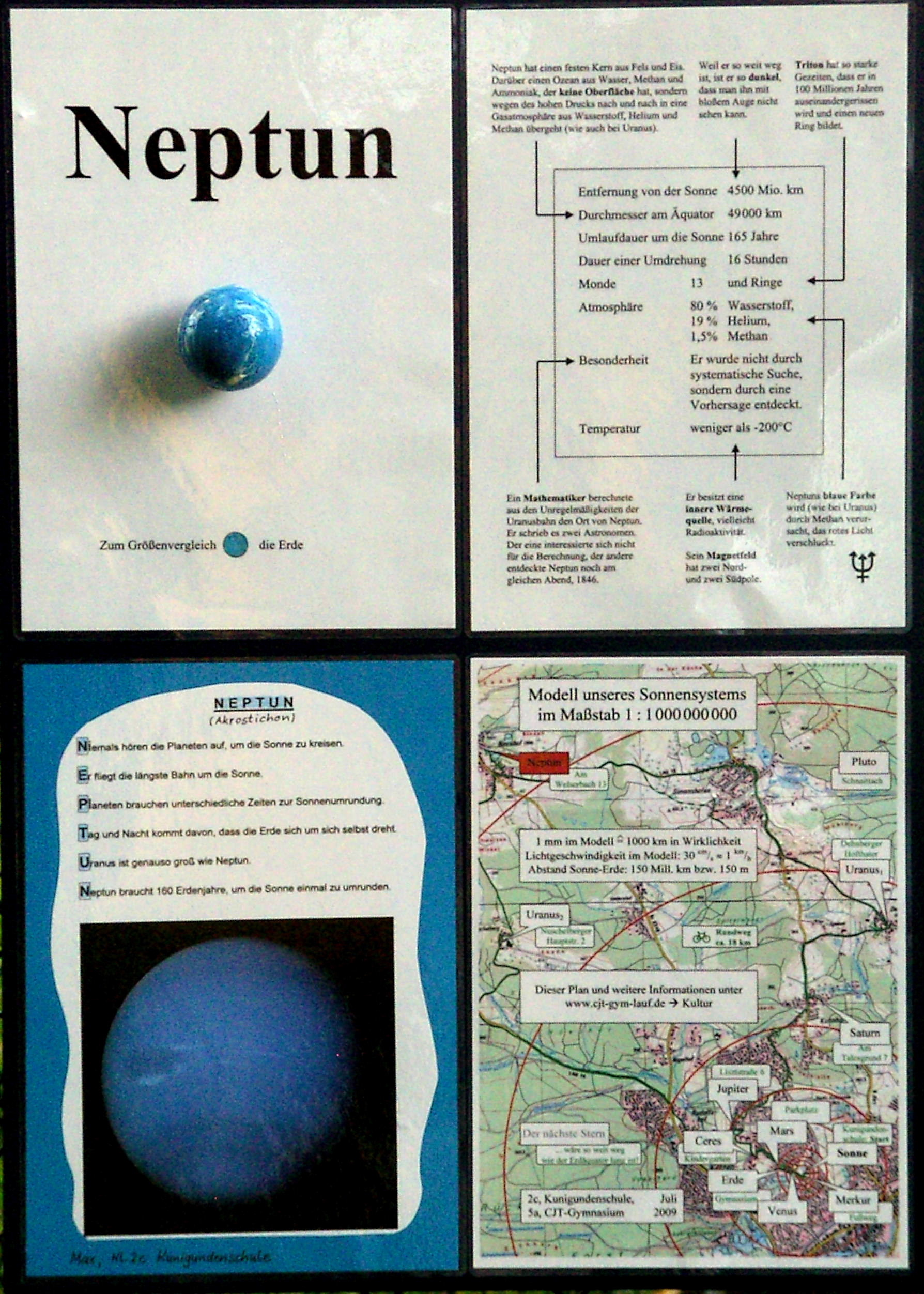 Modell Neptun Planetenweg Sonnensystem 1:1 000 000 000 Kunigundenschule 'Lauf an der Pegnitz' Neunhof Informationstafel